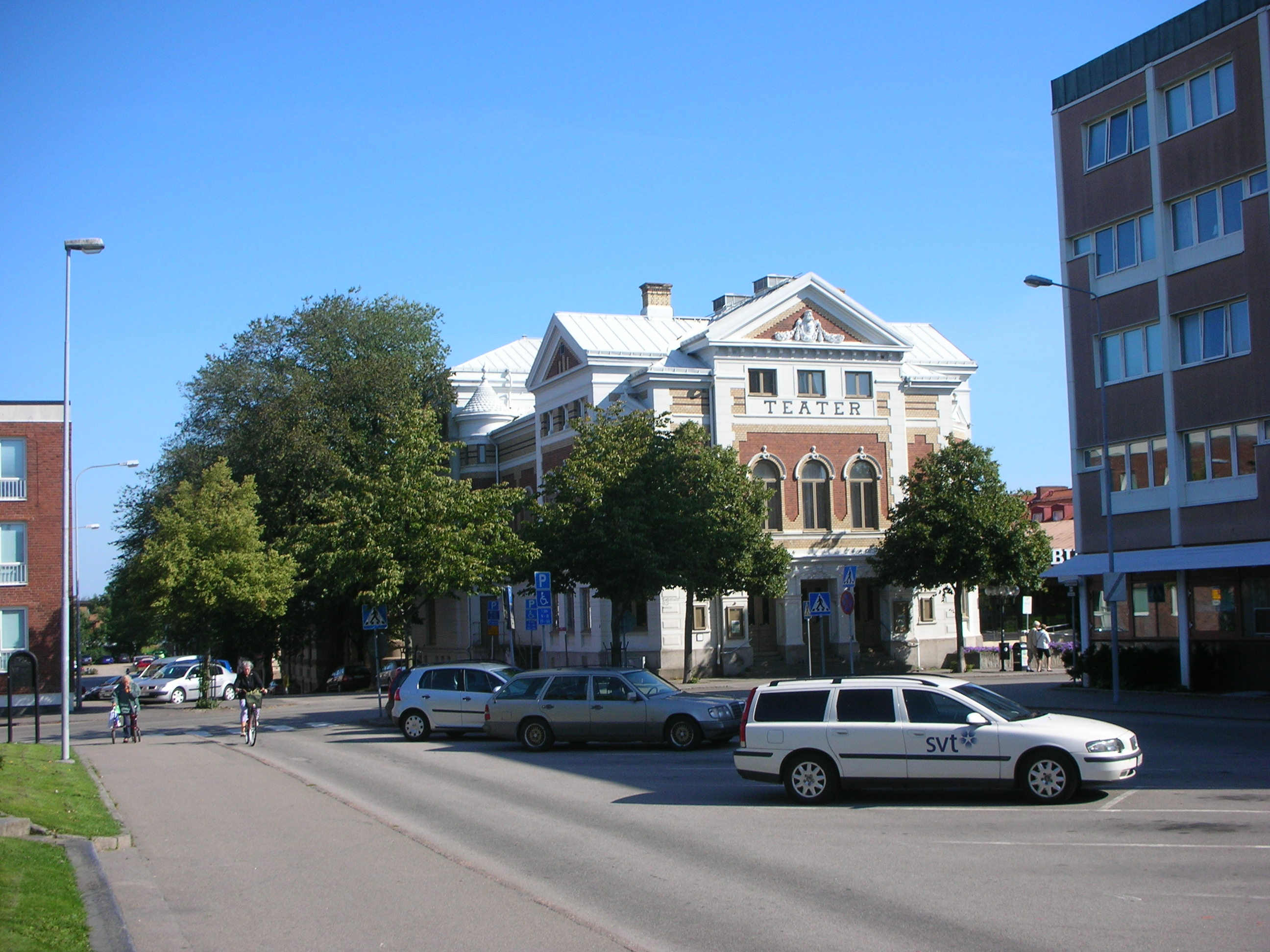 Varberg Teater med Kungsgatan i förgrunden.